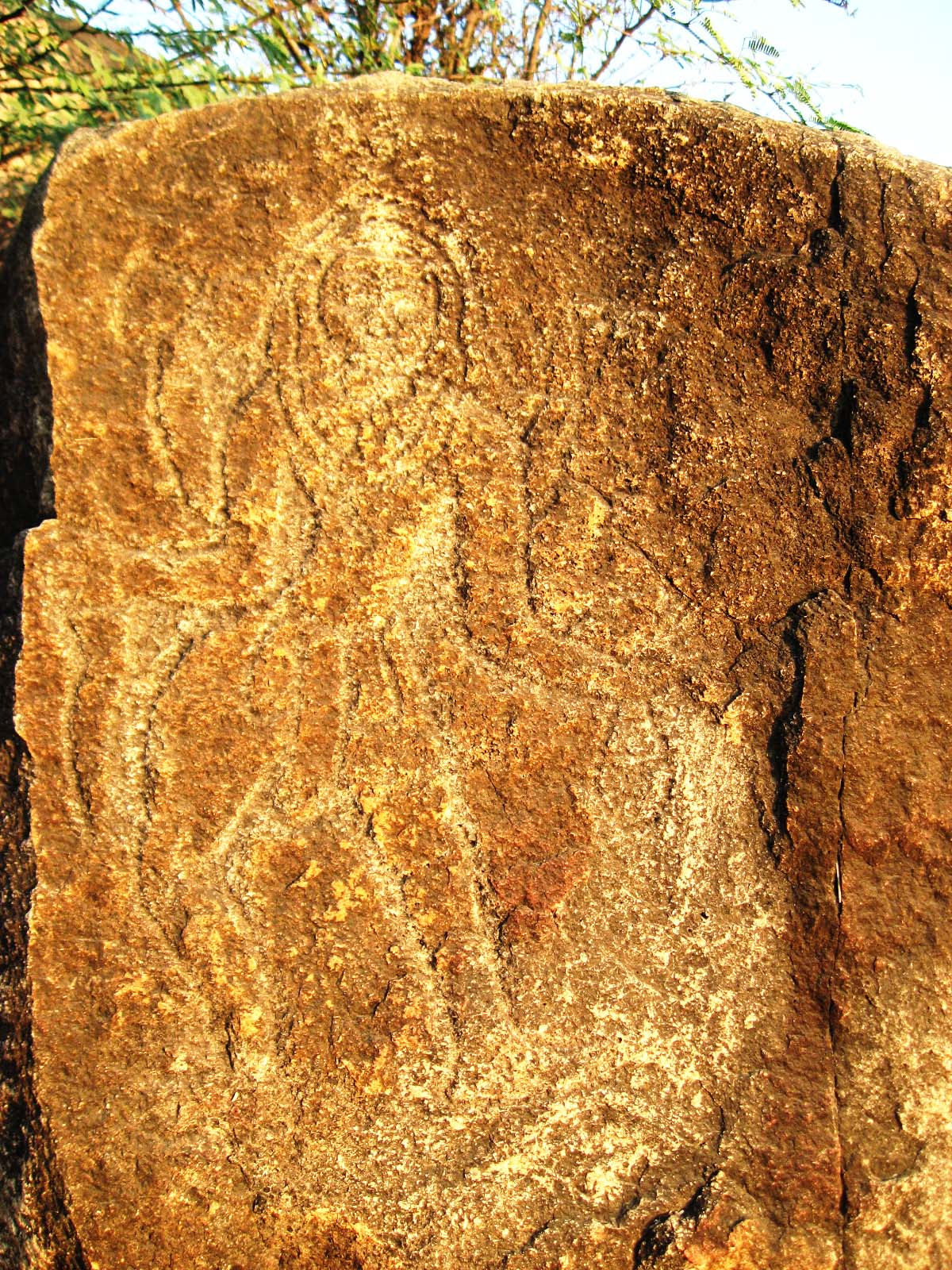 ఆలేరునదిలో భైరవుడు